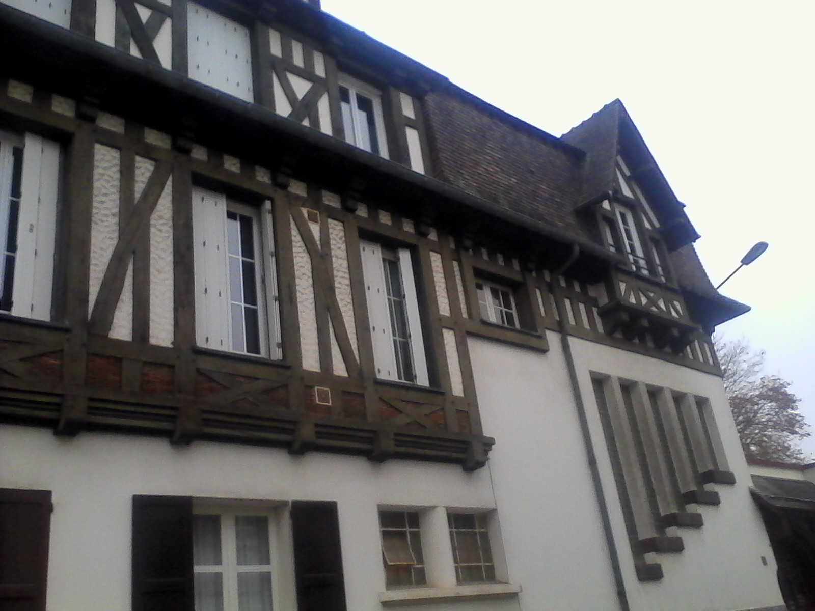 Maison style anglo-Normand XX e siecle